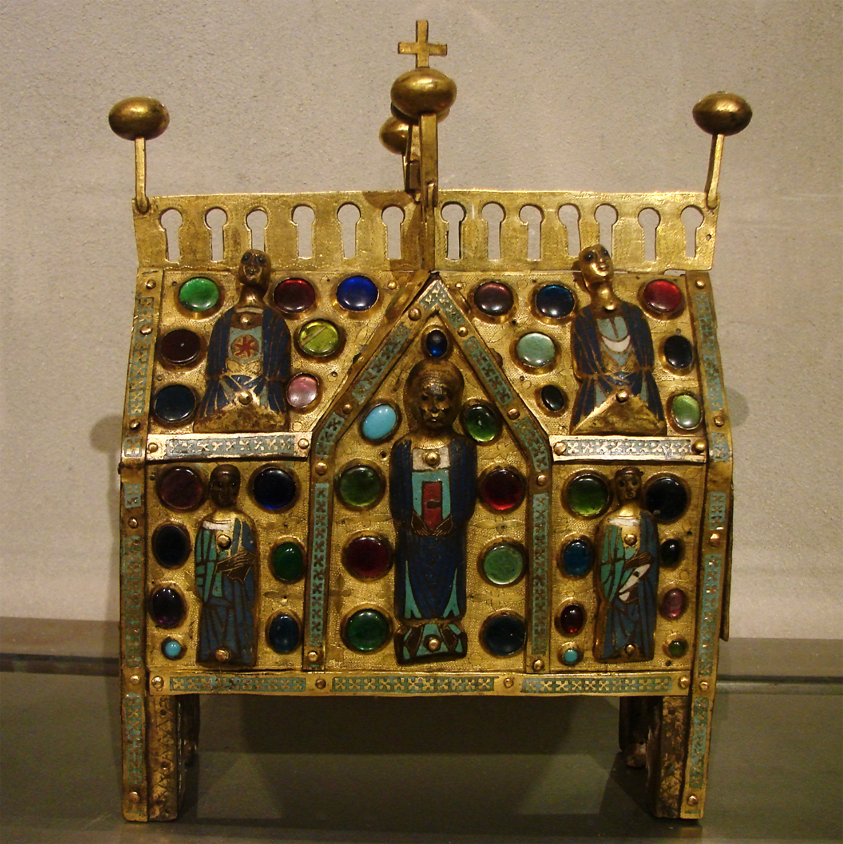 Châsse, Limoges, 13ème siècle; âme de bois, émaux champlevés et cabochons, cuivre doré et gravé. Musée des Beaux-Arts de Lille.